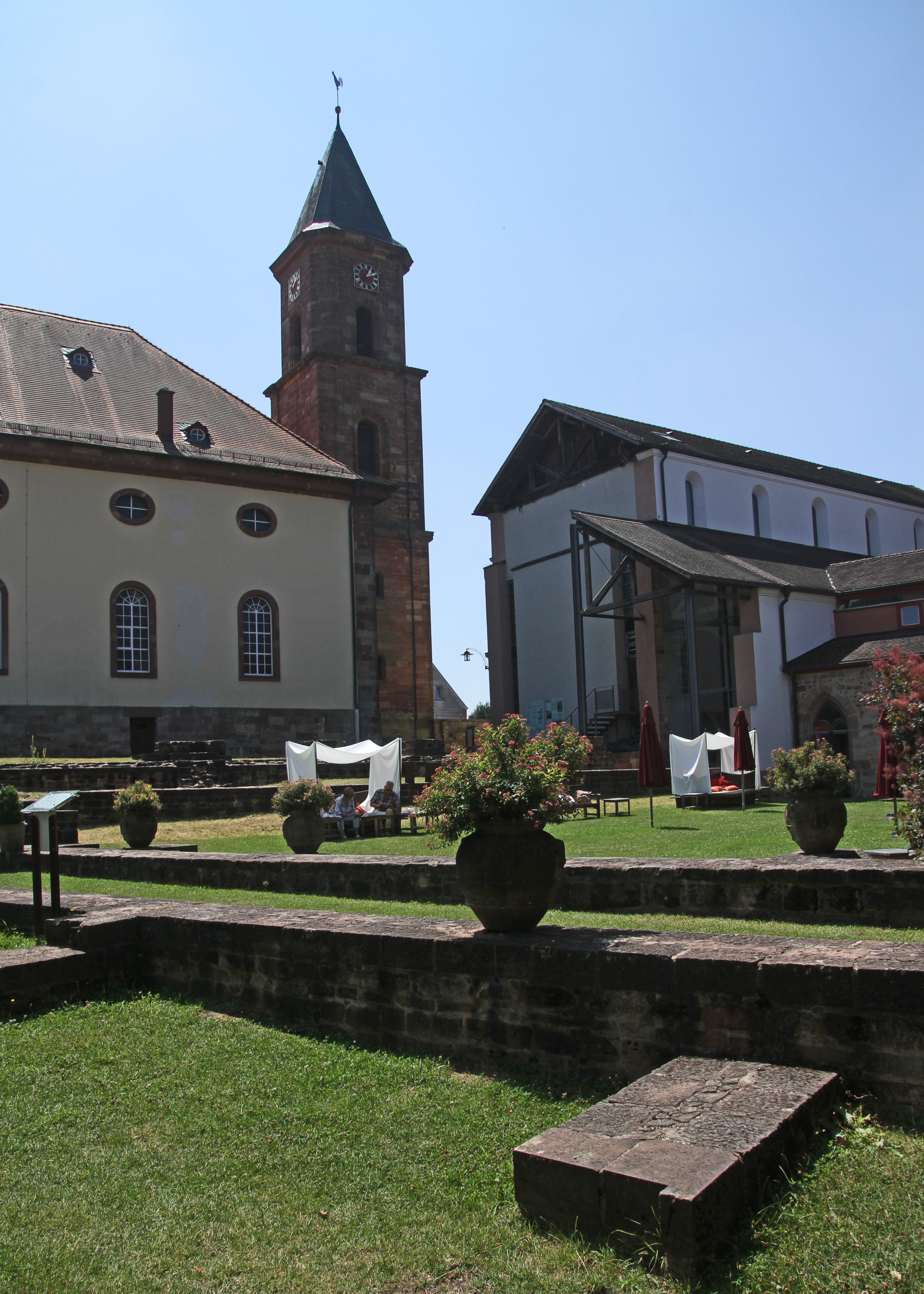 Kloster Hornbach